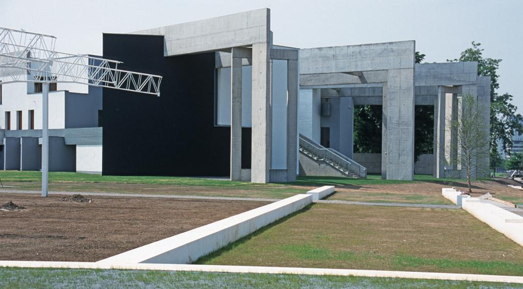 Jewish Community Center, Duisburg, by architect Zvi Hecker Beschreibung: Jüdisches Gemeindezentrum Mülheim / Oberhausen, Duisburg, Bild 1